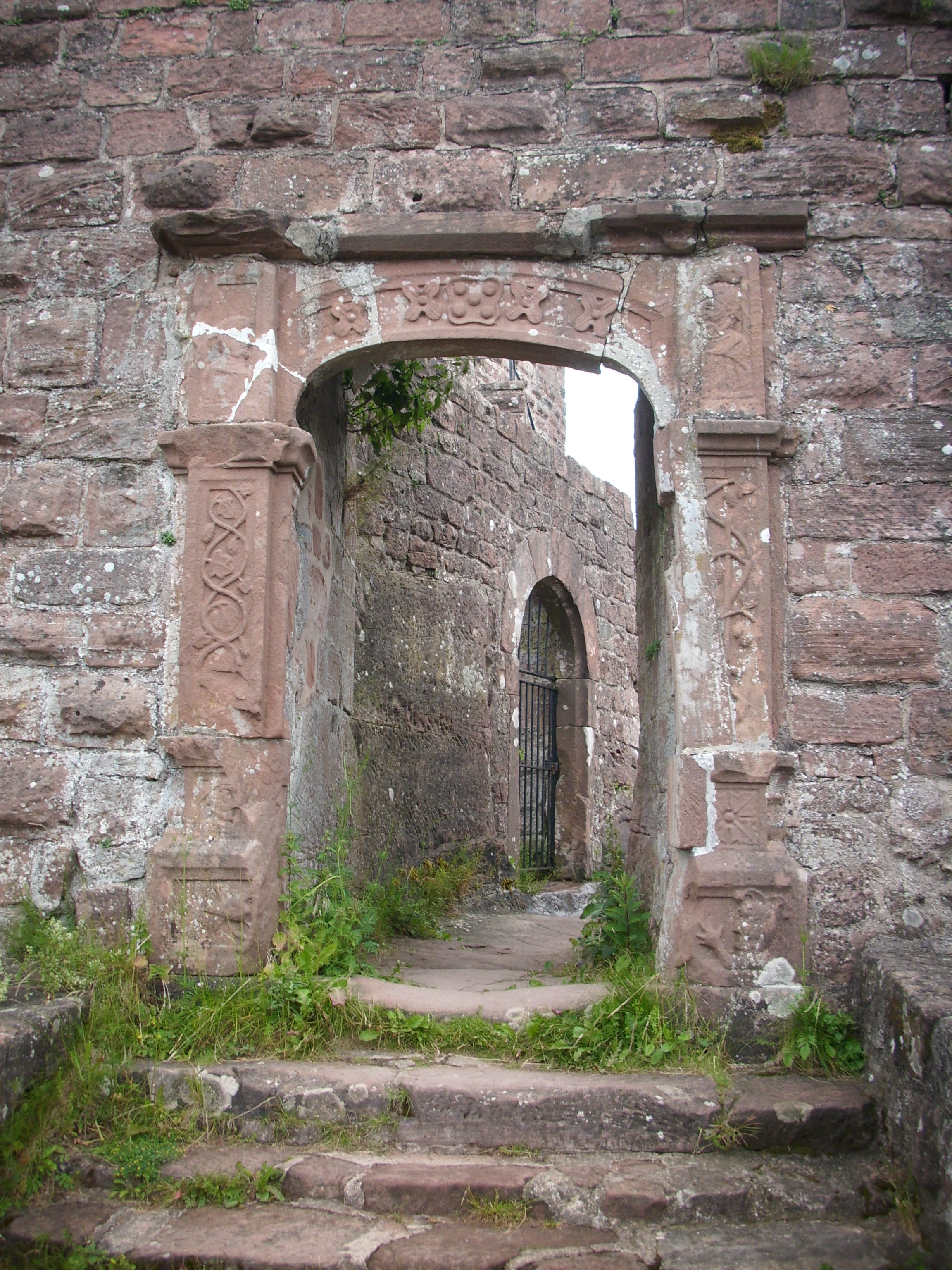 Château-ruines Hohenbourg